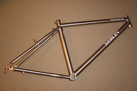 "Merlin" titanium frame